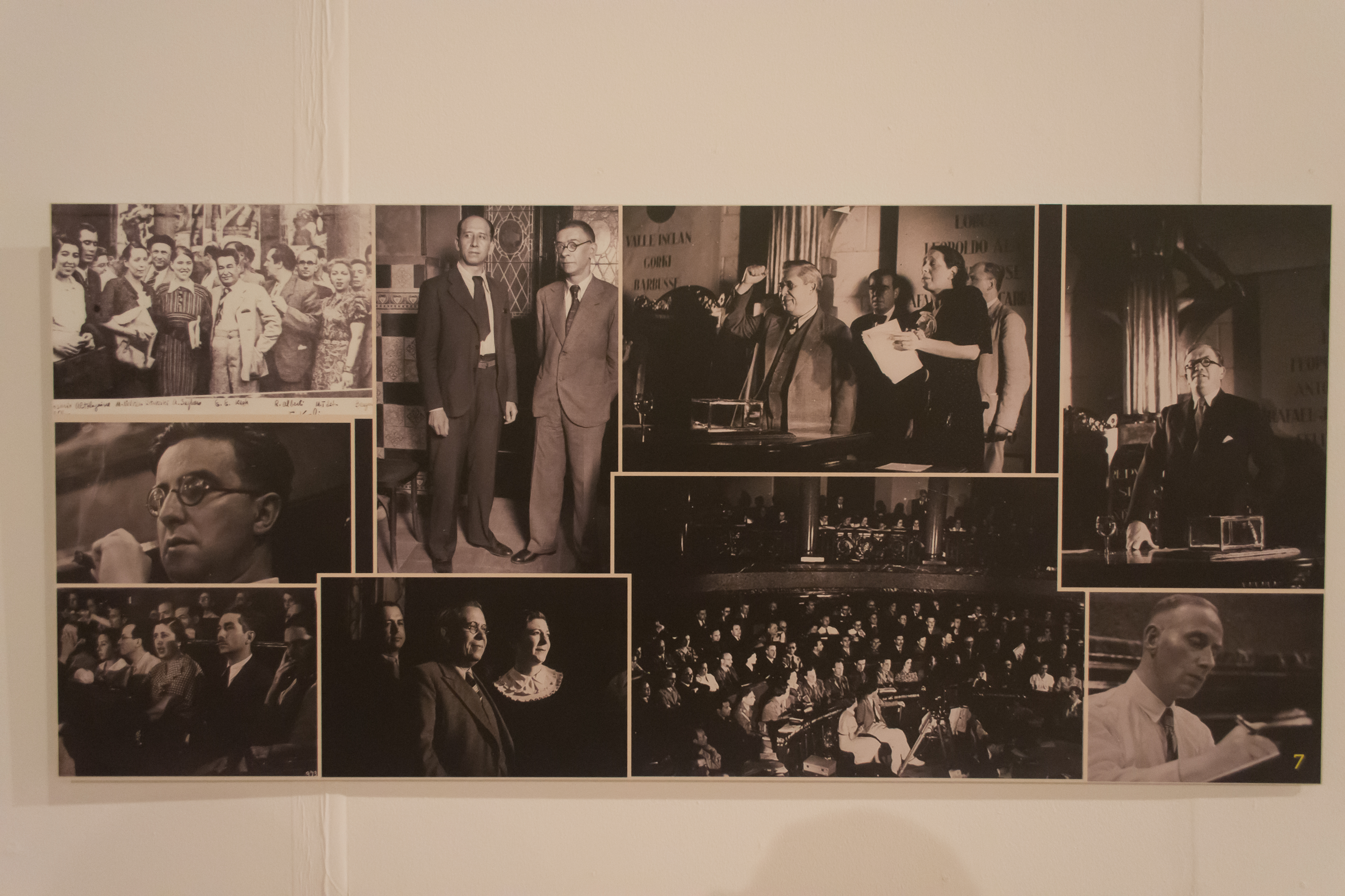 Segundo Congreso Internacional de Escritores para la Defensa de la Cultura. Exposición Por la defensa de la Cultura en el Centro del Carmen de Valencia.